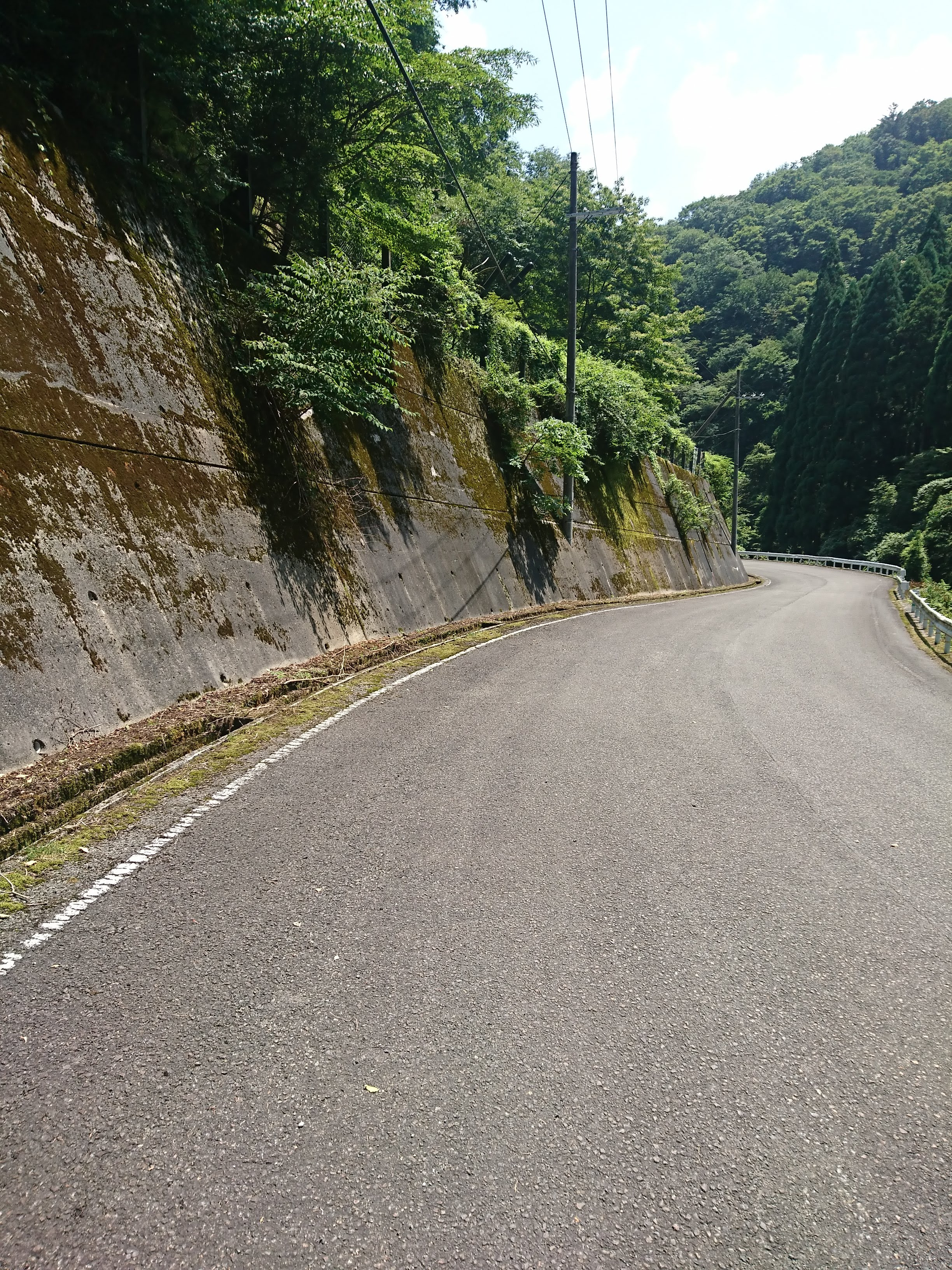 ヒノコと大見集落の間の大原花背線の部分供用箇所。